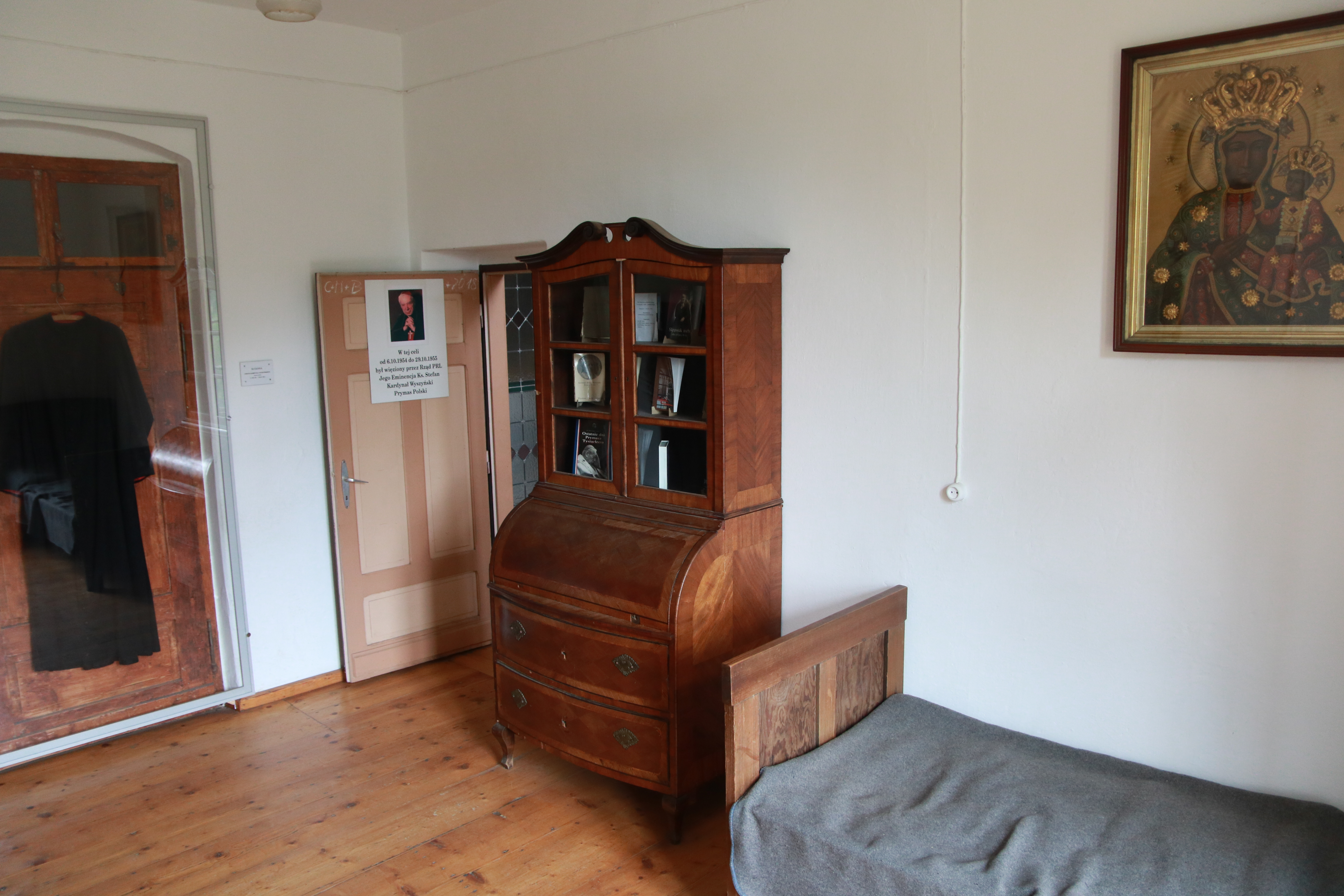 Cela w Kościele św. Józefa w Prudniku-Lesie, w której od 6 października 1954 do 24 października 1955 więziony był Prymas Tysiąclecia Stefan Wyszyński.